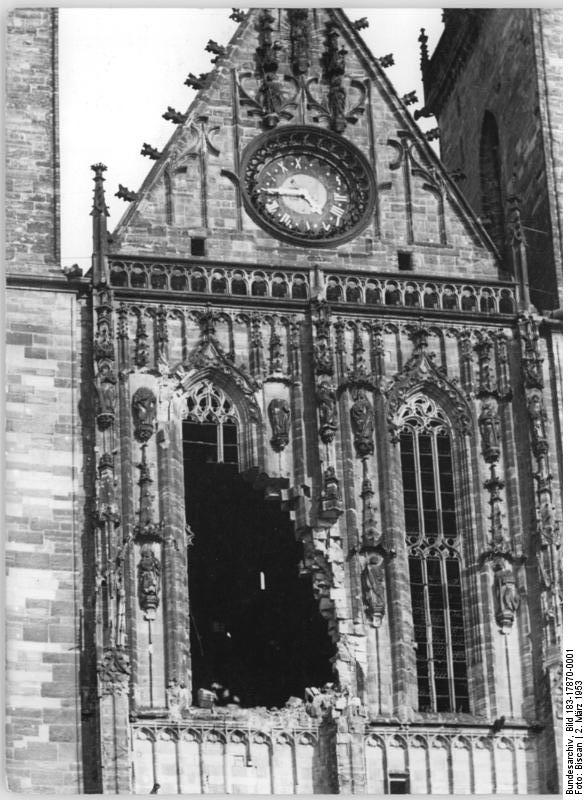 Zentralbild-Biscan Schw-Wi. 2.3.1953 Wiederaufbau des Magdeburger Domes Der Magdeburger Dom, der im Januar 1945 durch einen anglo-amerikanischen Bombenangriff schwer beschädigt wurde, wird unter Leitung des Landeskonservators und Nationalpreisträgers Wolf Schubert wiederhergestellt. Kürzlich konnte ein weiterer Bauabschnitt, der Mittelbau der westlichen Seite des Doms, fertiggestellt werden. UBz, Der beschädigte Mittelbau der westlichen Domseite vor seiner Wiederherstellung.